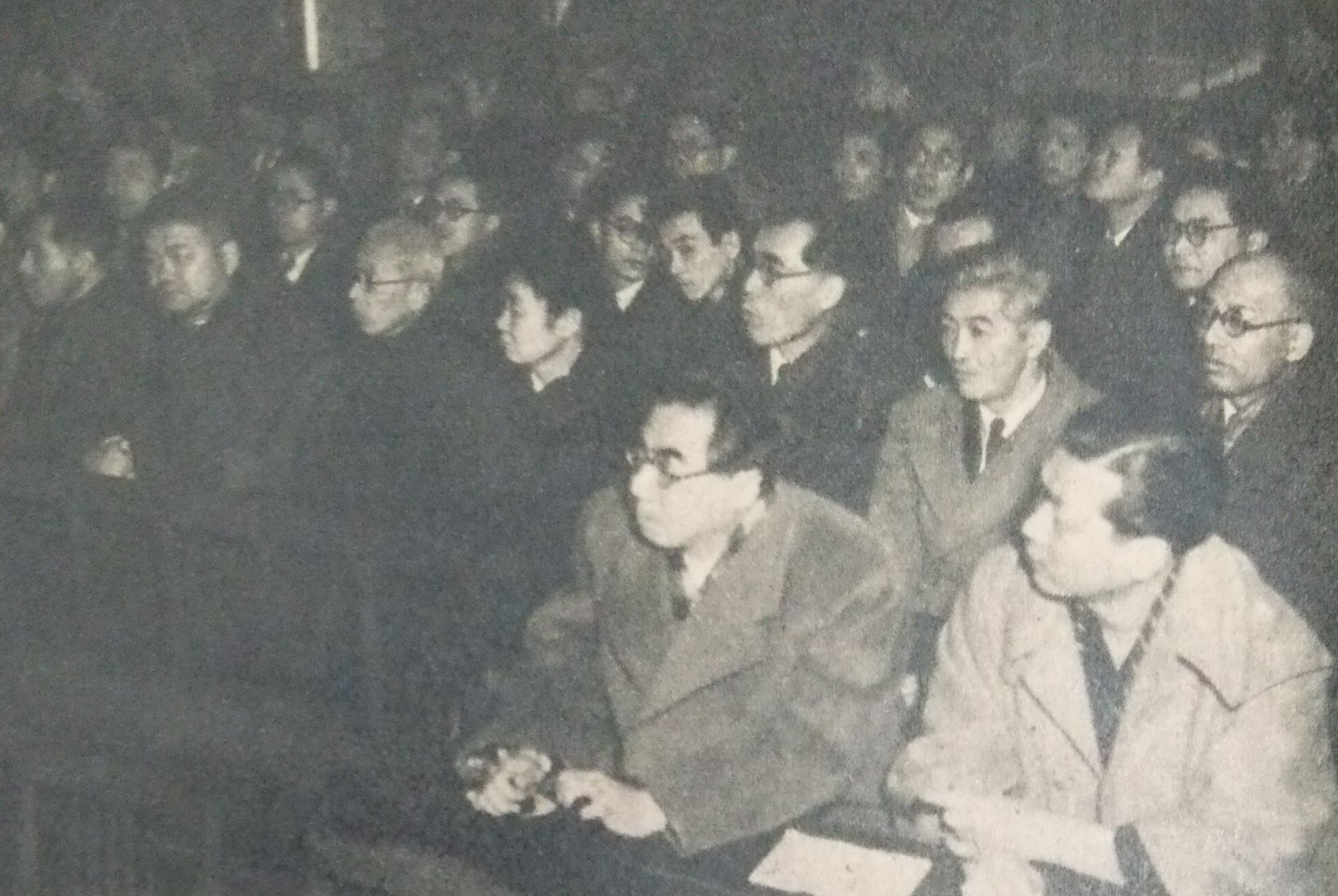 チャタレー裁判の傍聴に訪れた作家たち。最前列右から、林房雄、坂口安吾。二列目右から、中野好夫、亀井勝一郎、高橋健二、板垣直子。